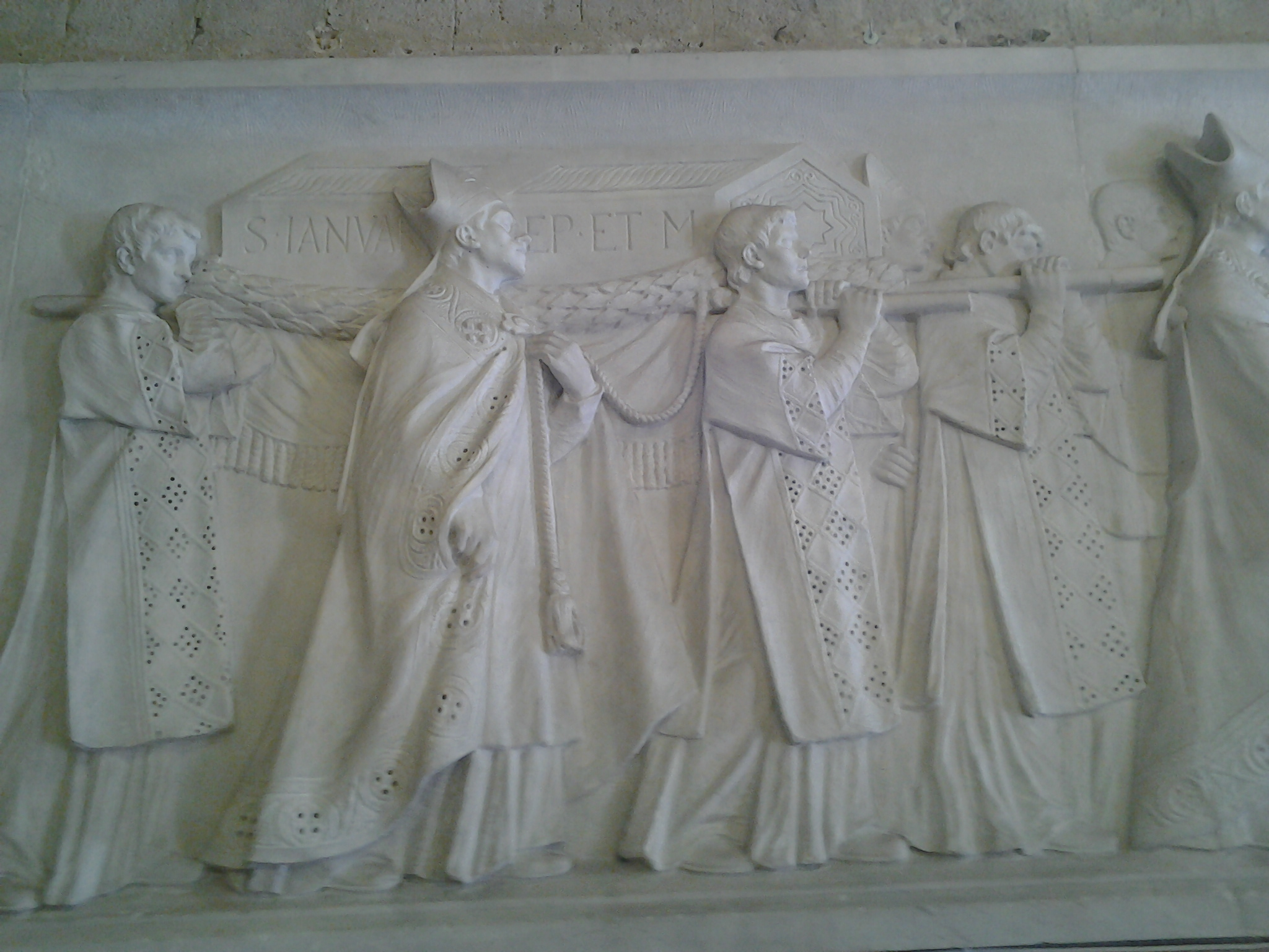 Basilica di San Gennaro ad Antignano (Napoli): Nella navata destra, sulla parete destra, al centro, c'è un bassorilievo rettangolare, di marmo bianco, raffigurante la traslazione del corpo di san Gennaro dal titolo Traslazione del Corpo di San Gennaro, del 1936, opera di Vincenzo Meconio (Napoli, 1900 - Napoli, 1945).